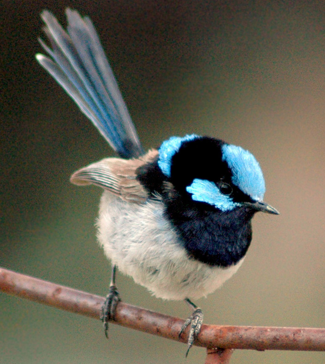 Malurus cyaneus cyaneus, Tasmanian midlands.